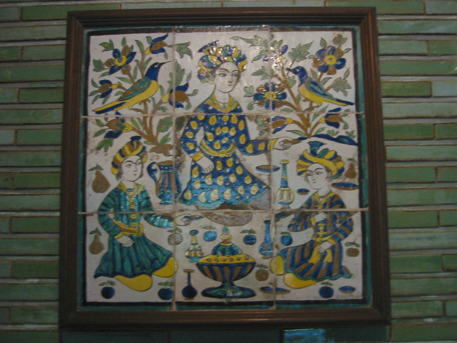 神戸、旧乾邸 (渡辺節)絵タイル(組タイル)とマジョリカタイル?。神戸市東灘区住吉山手５